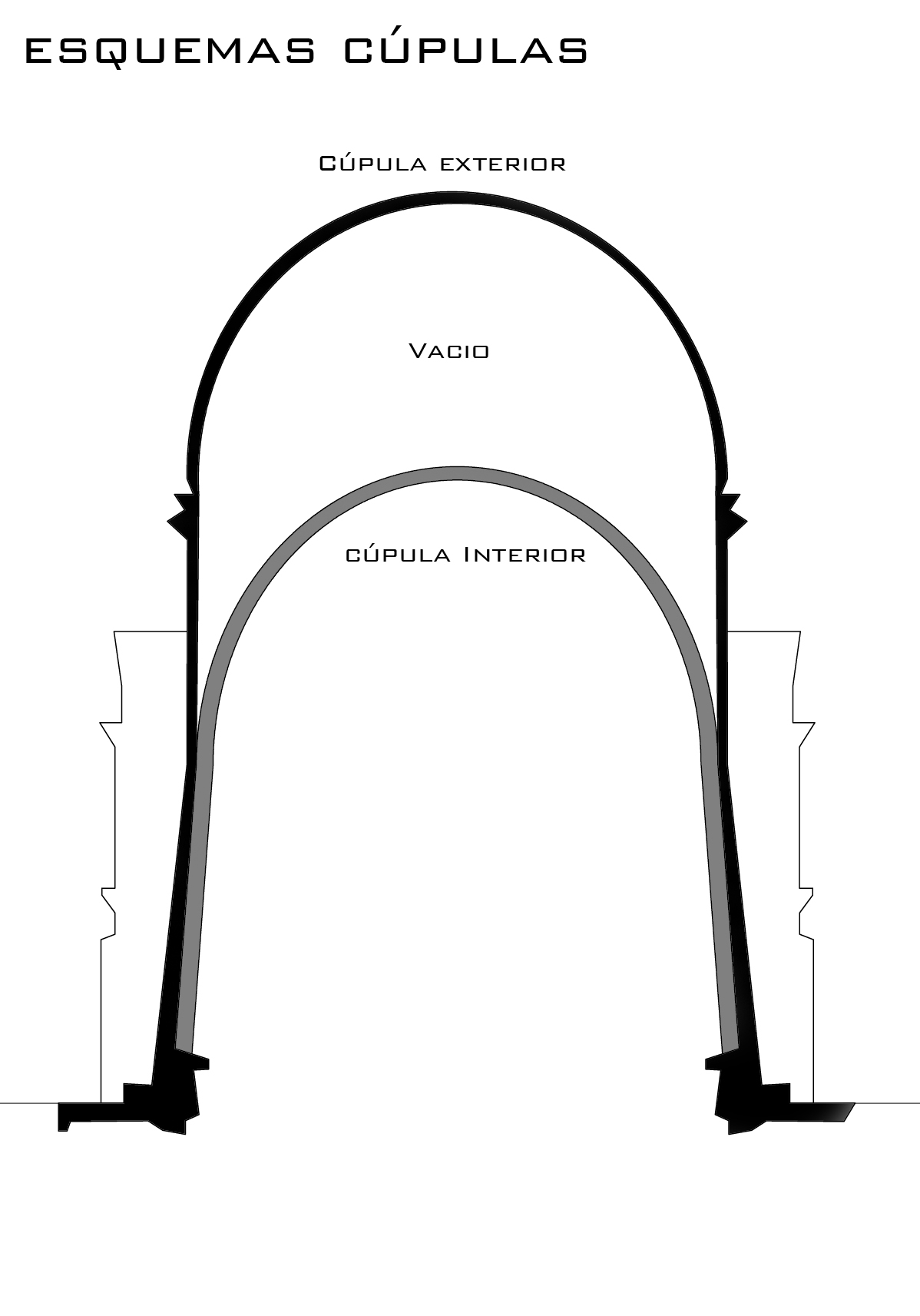 Esquema